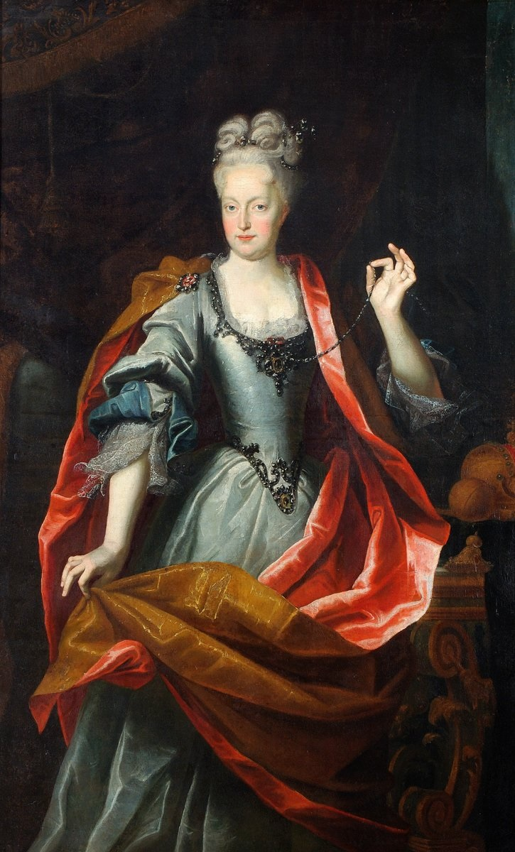 L'imperatrice Elisabetta Cristina di Brunswick-Wolfenbüttel, moglie di Carlo VI